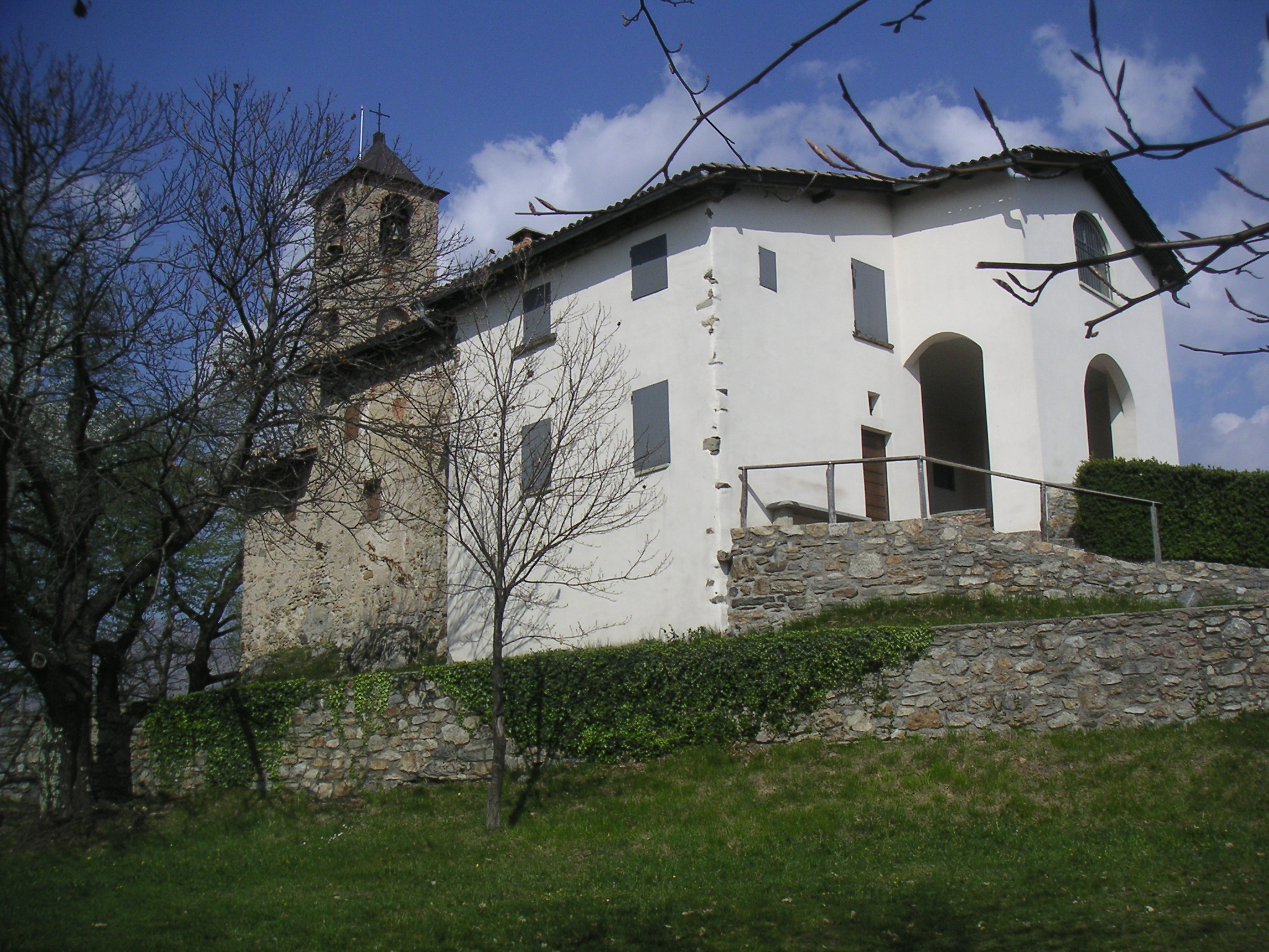 Oratorio di San Bernardo di Chiaravalle a Comano